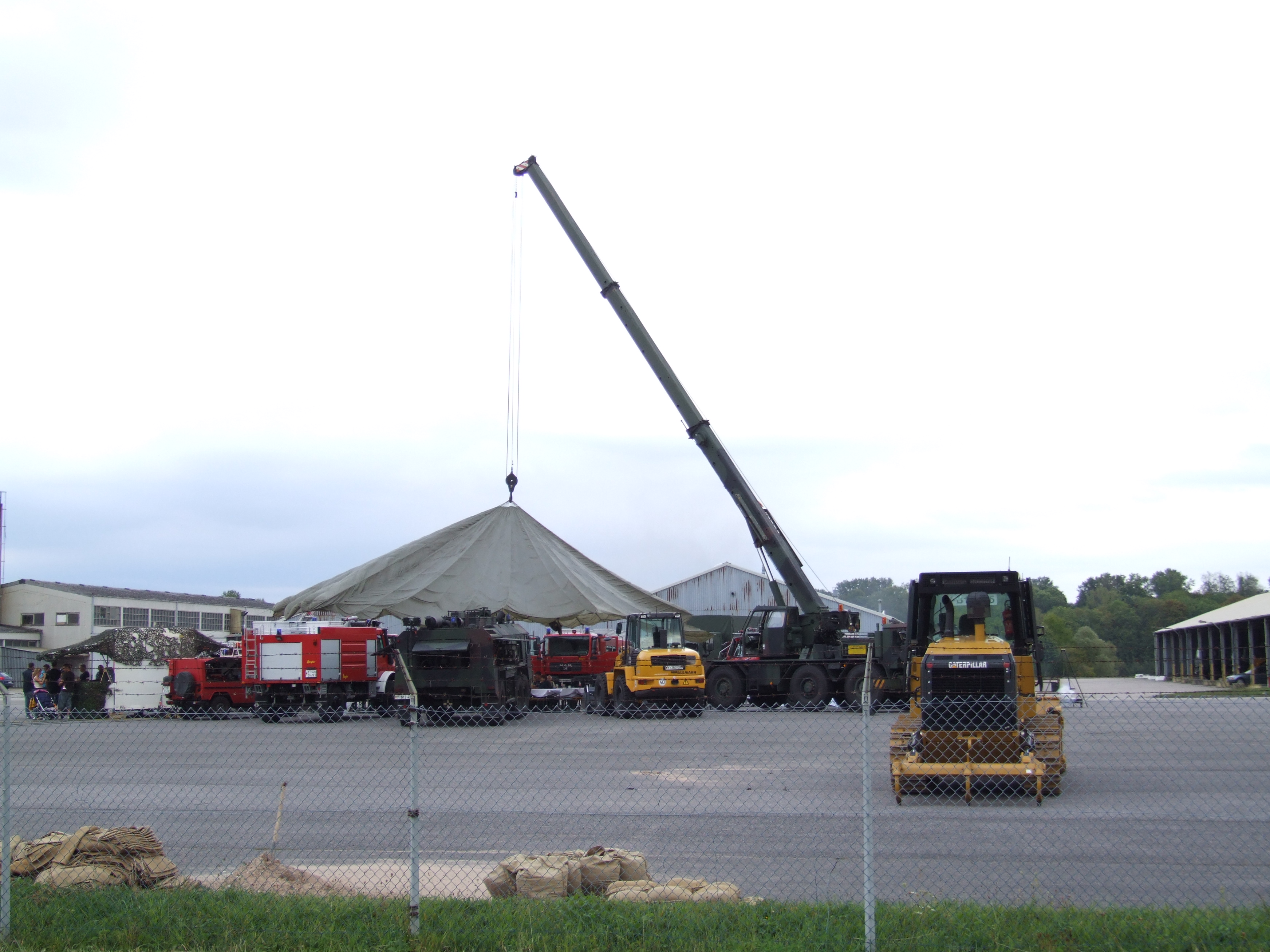 Aktivitäten am Wasserübungsplatz Reffental des Spezialpionierbataillon 464